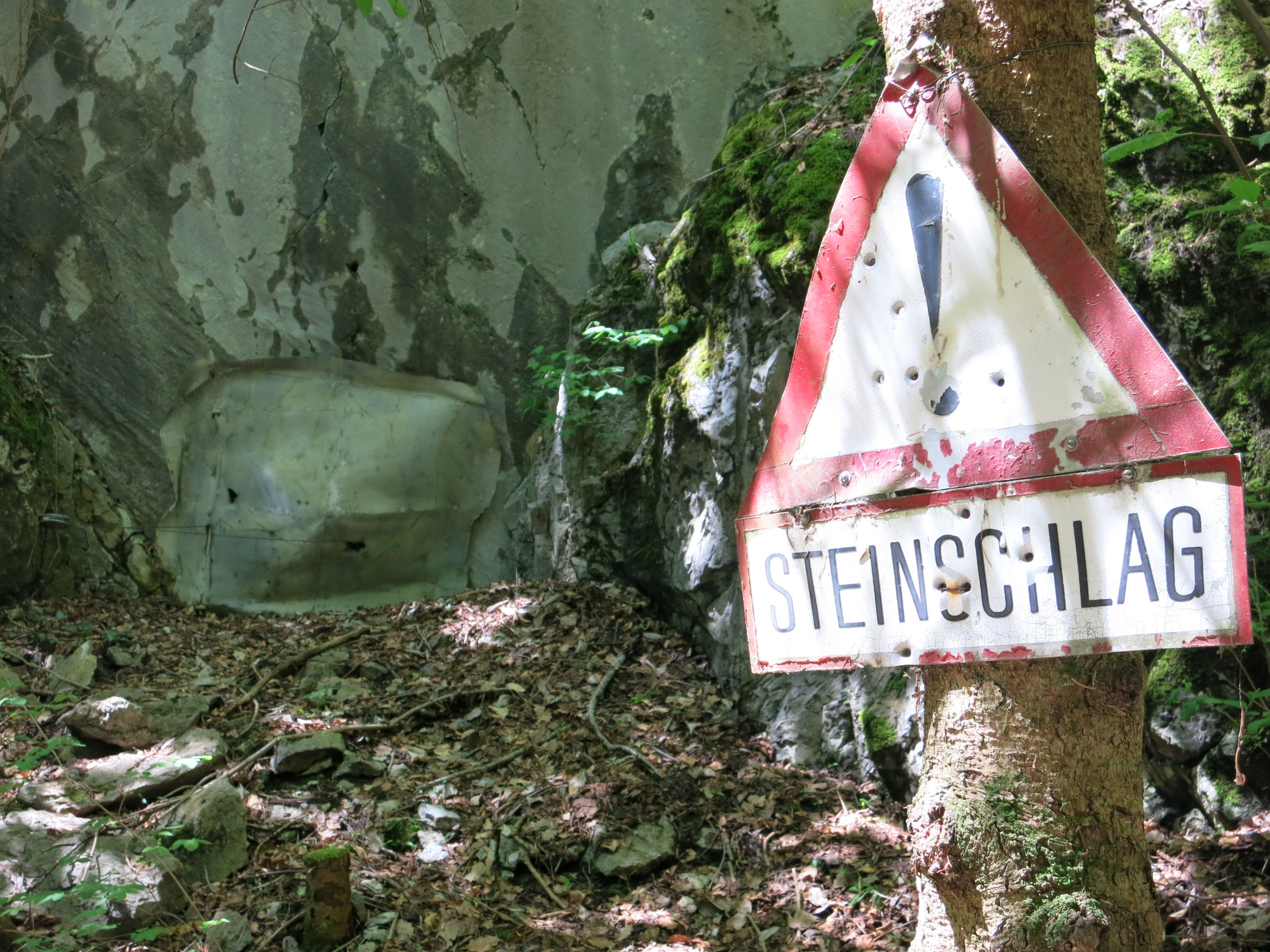 KP Heinrich, Spiez BE, Schweiz